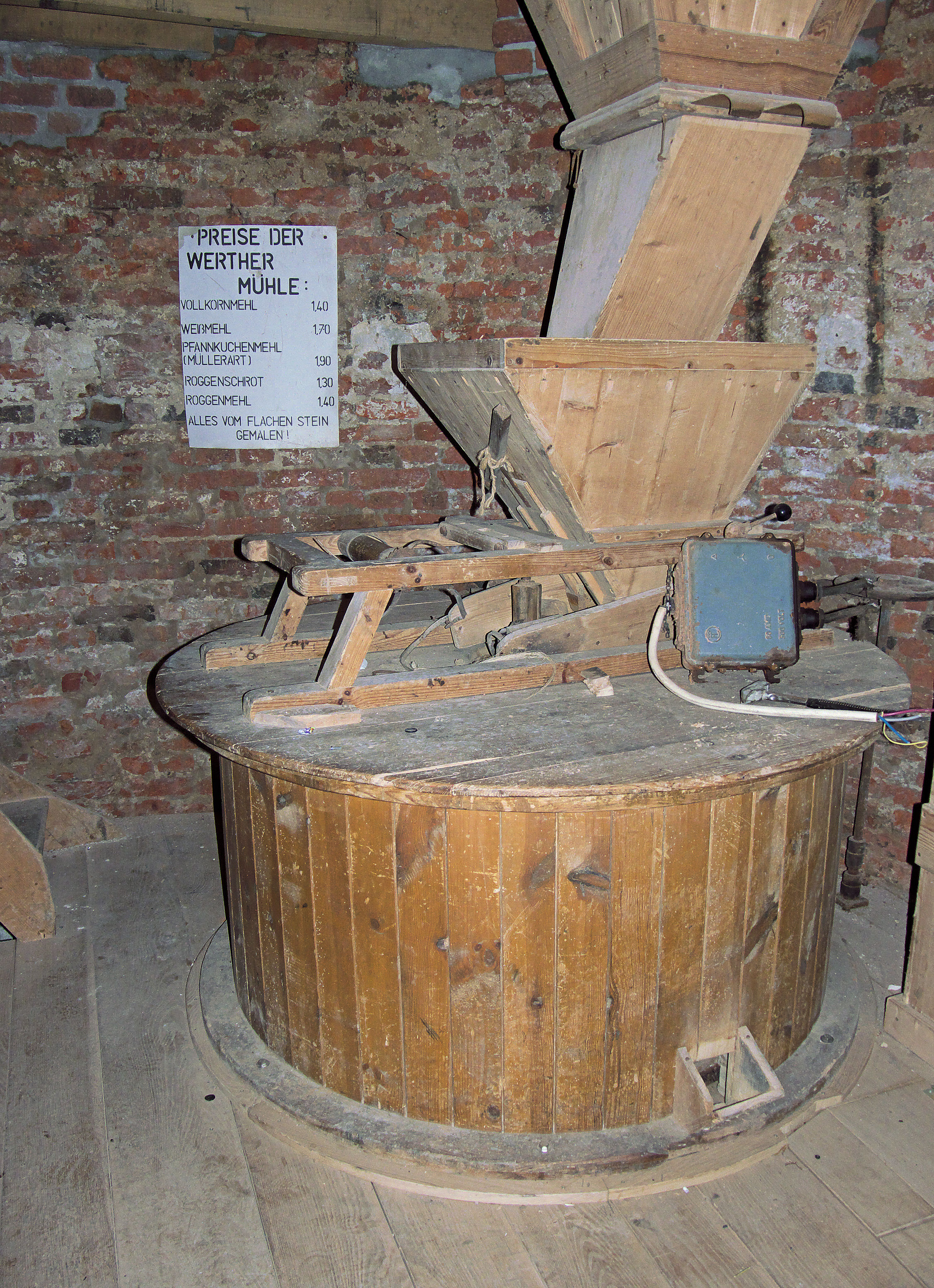 Molen Turmwindmühle Werth, Duitsland: electrisch aangedreven maalkoppel